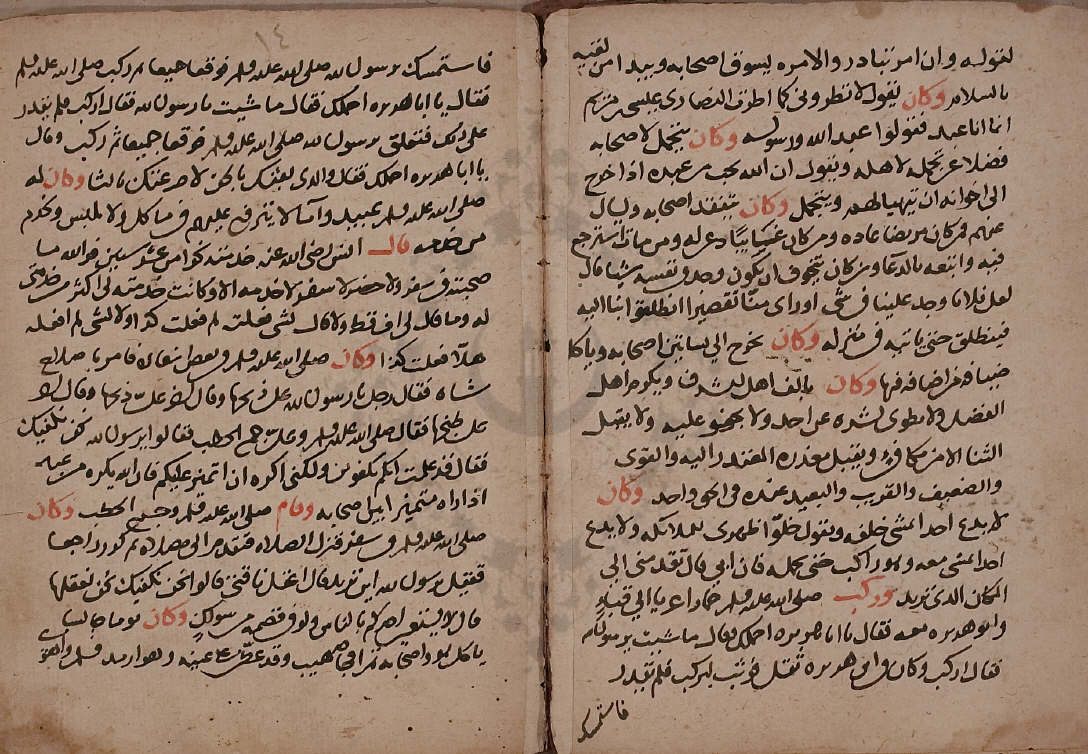 العنوان : خلاصة سير سيد البشر المؤلف : محب الدين أبي جعفر الطبري نبذه عن الكتاب : مختصر فيه ذكر نسب رسول الله صلى الله عليه وسلم وميلاده ونبذ من غزواته وأحواله وحجه وعمره وأسمائه وصفاته وبعض مكارم أخلاقه ومعجزاته وذكر أزواجه وبنيه وبناته وأعمامه وعماته وذكر خدمه وخيله ونعمه وسلاحه وأثاثه وثيابه ووفاته صلى الله عليه وسلم User:Tarawneh/rami